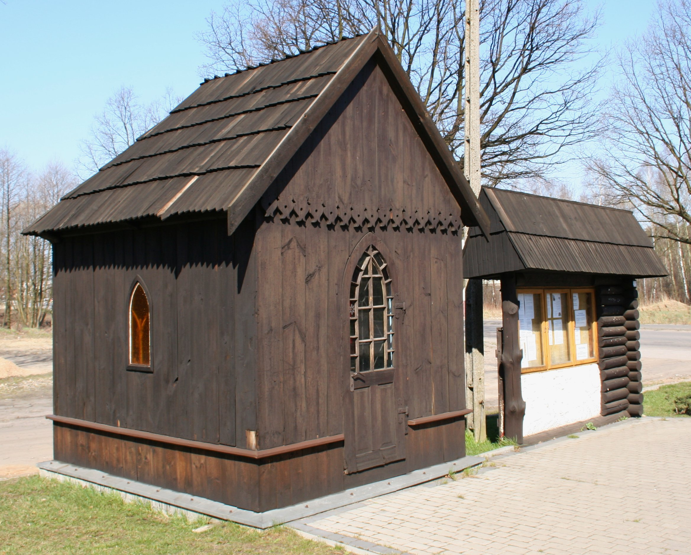 kapliczka św. Jana Nepomucena przy kościele parafialnym w Boronowie, powiat lubliniecki, województwo śląskie